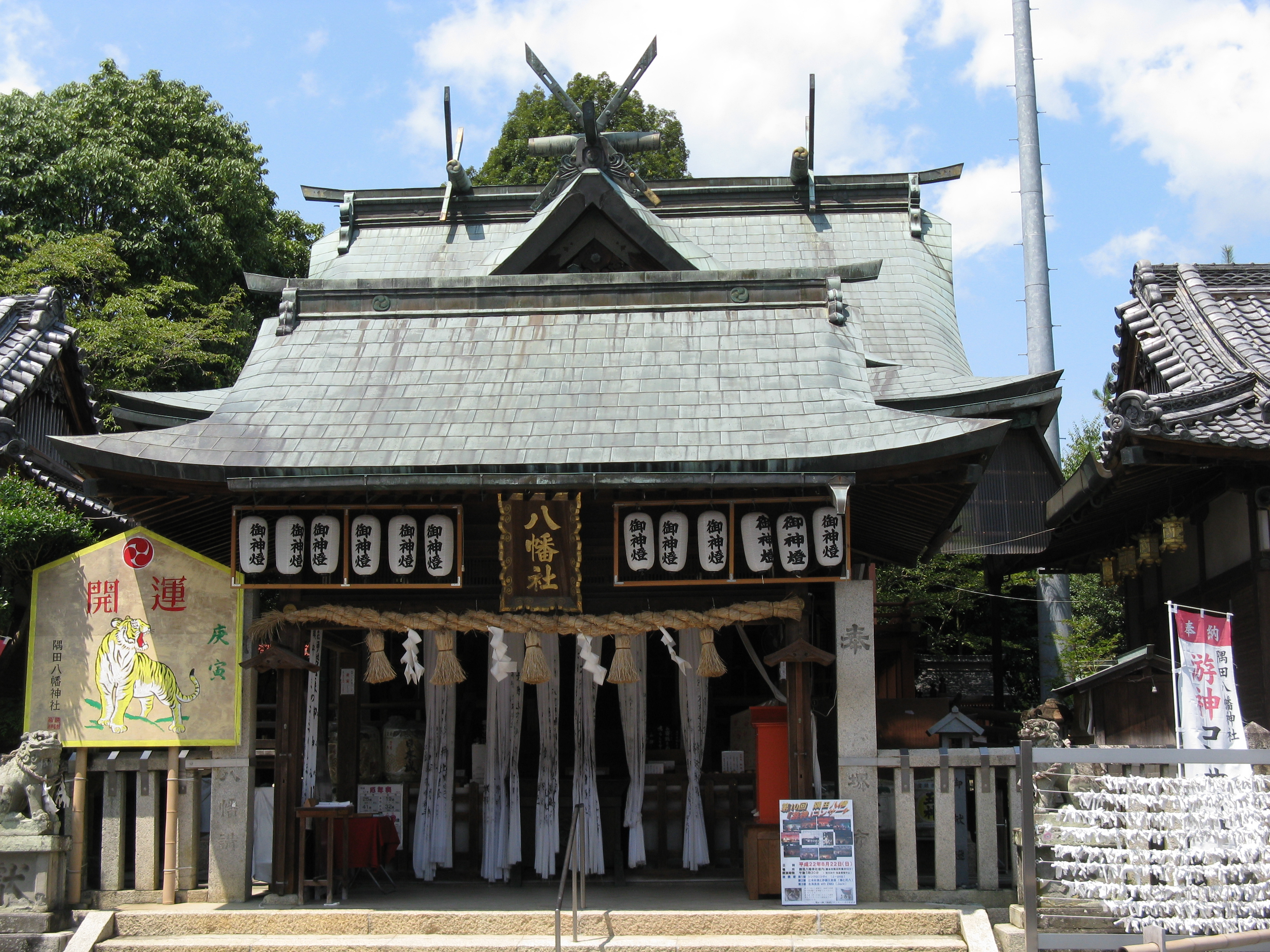 隅田八幡神社 拝殿